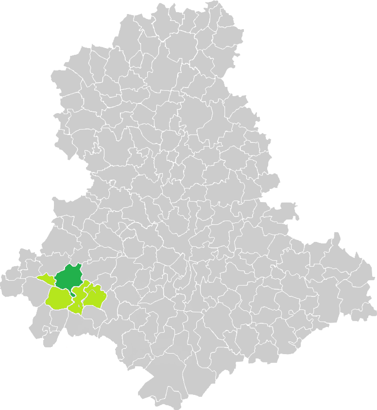 Carte de situation de la commune d'Oradour-sur-Vayres (en vert foncé) dans le votre Canton (en vert clair) sur une carte des communes de la Haute-Vienne